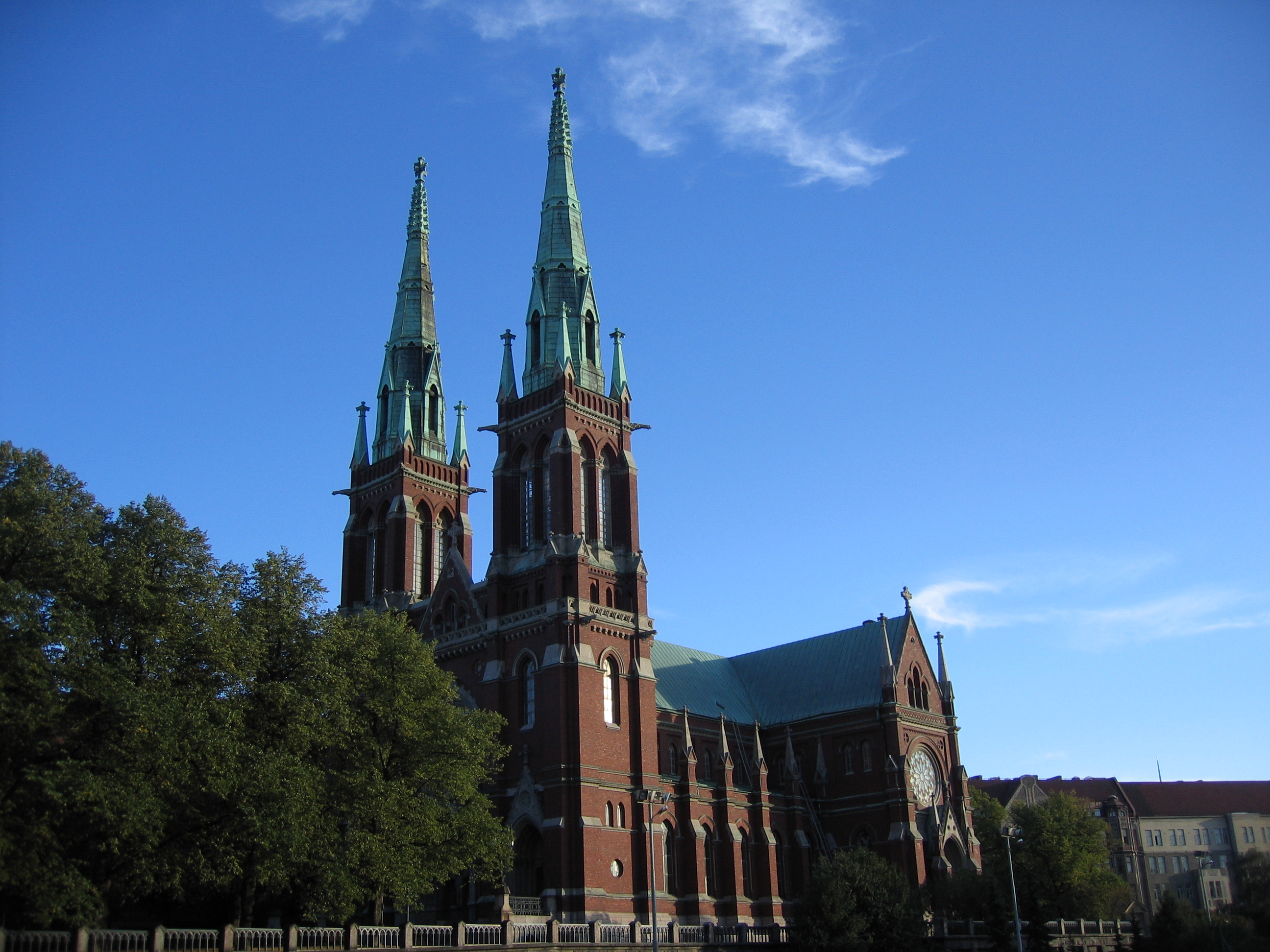 Johanneksenkirkko, Helsinki